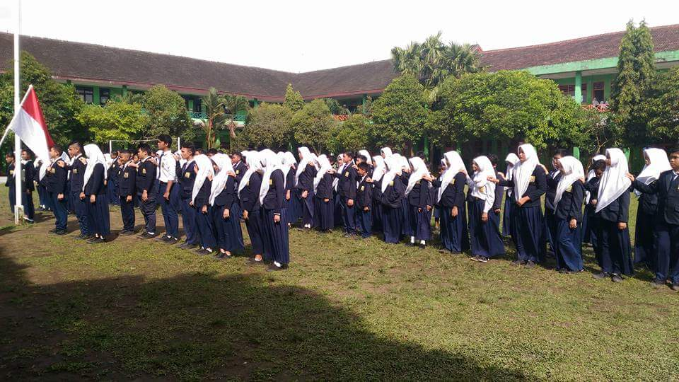 OSIS SMP Negeri 1 Medan